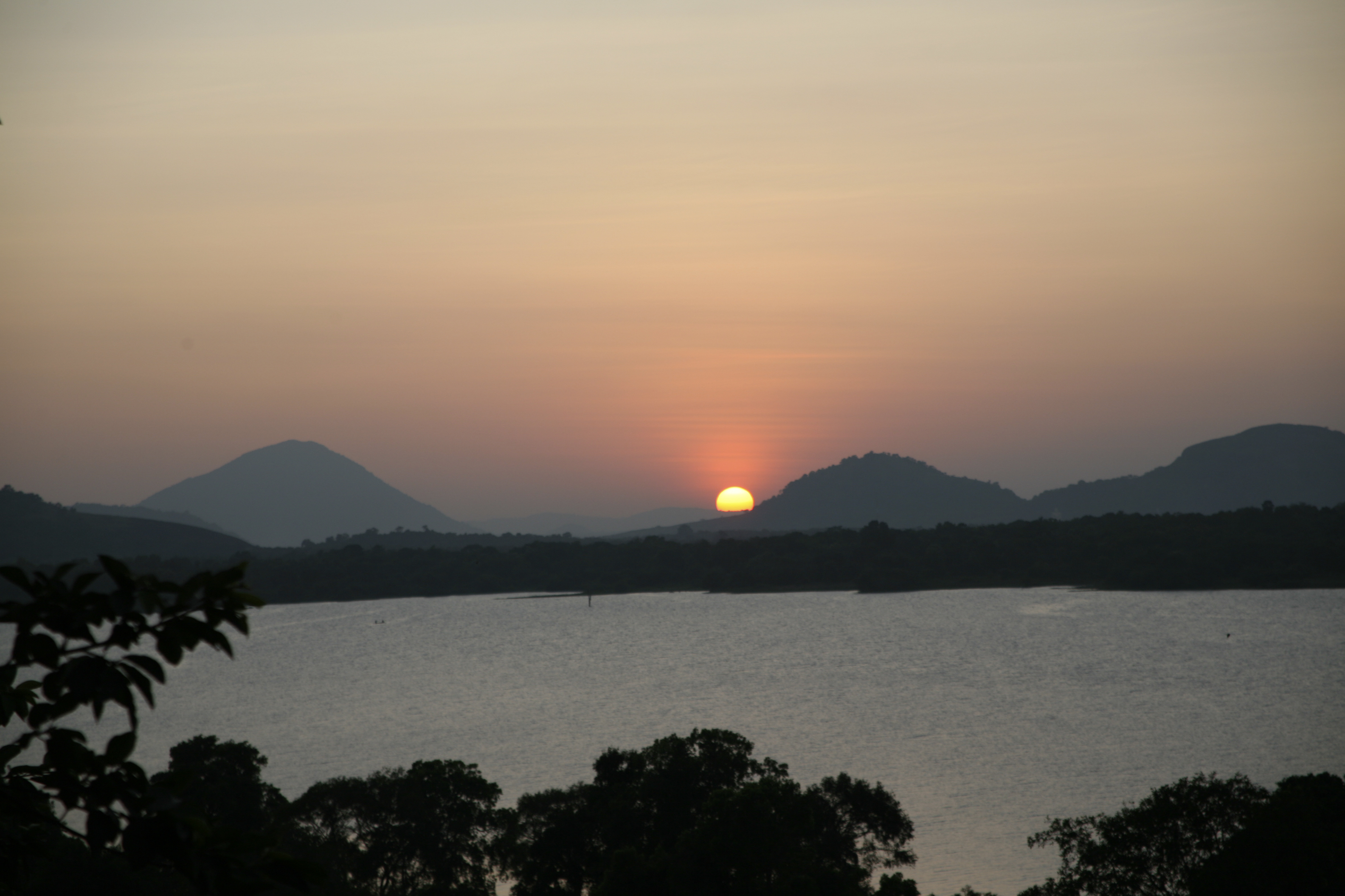 Sun setting over Kandalama Lake, Sri Lanka